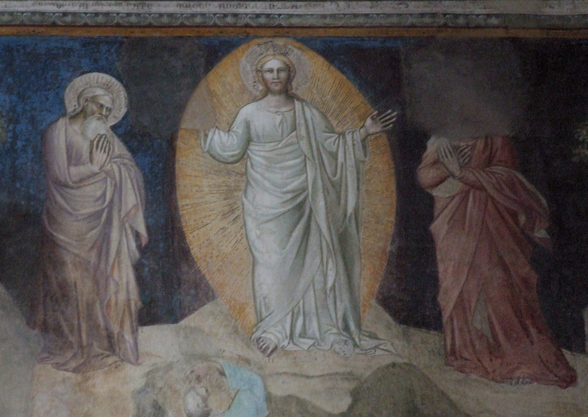 Chiesa San Antonio Abate del Tau, Pistoia, Italy